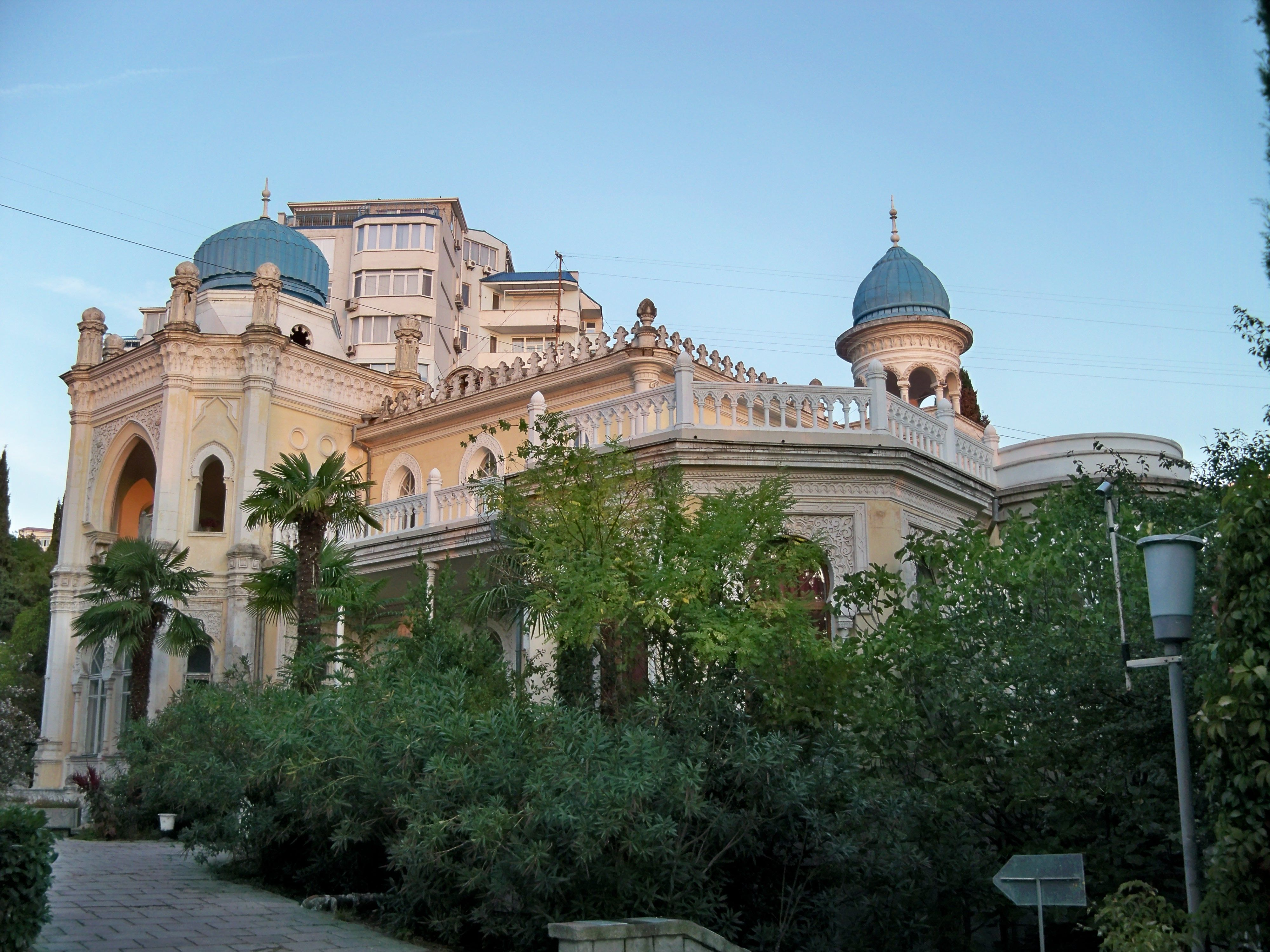 Палац «Еміра Бухарського Сейїд-Абдул-Ахад-Хана», м. Ялта